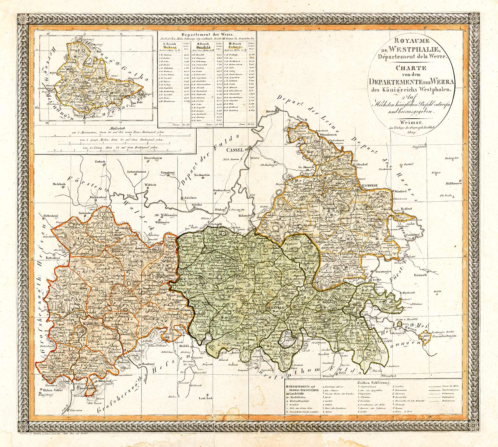 Charte von dem Departement der Werra im Königreich Westpahlen